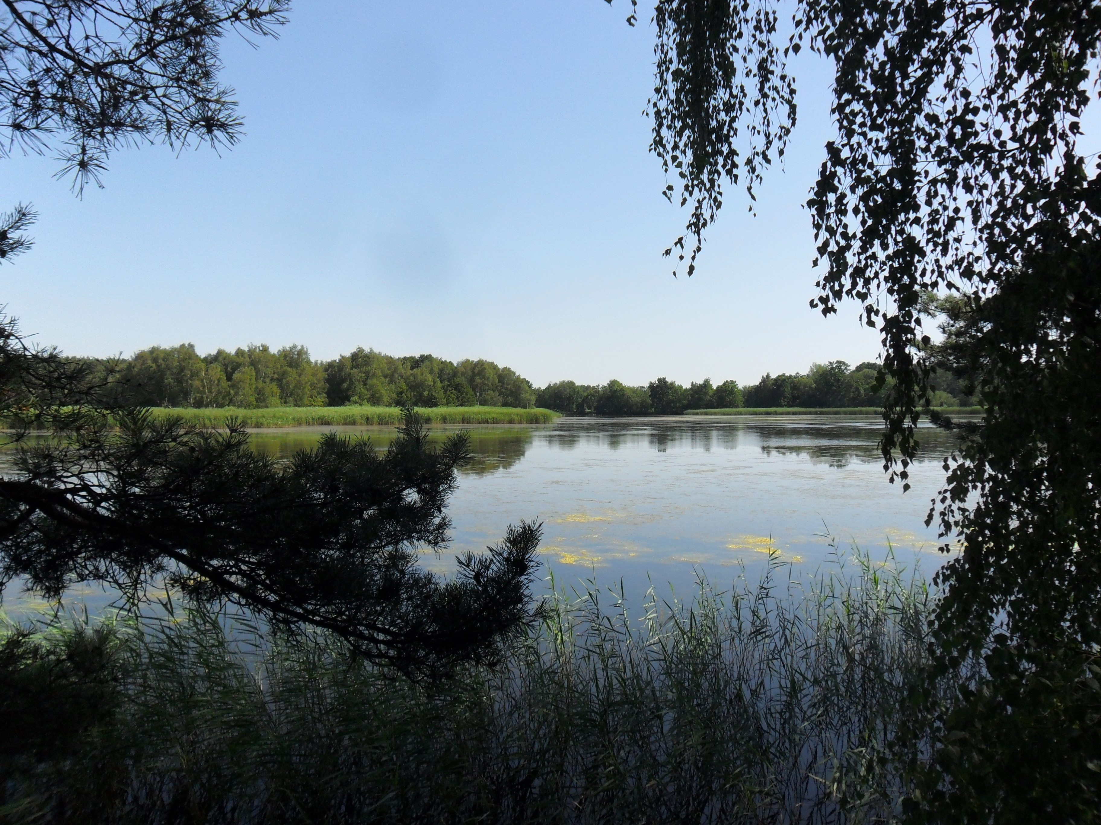 Großer Wochusteich nördlich von Lippitsch gelegen Hornjoserbsce: Wulki Wochoz sewjernje Lipiča